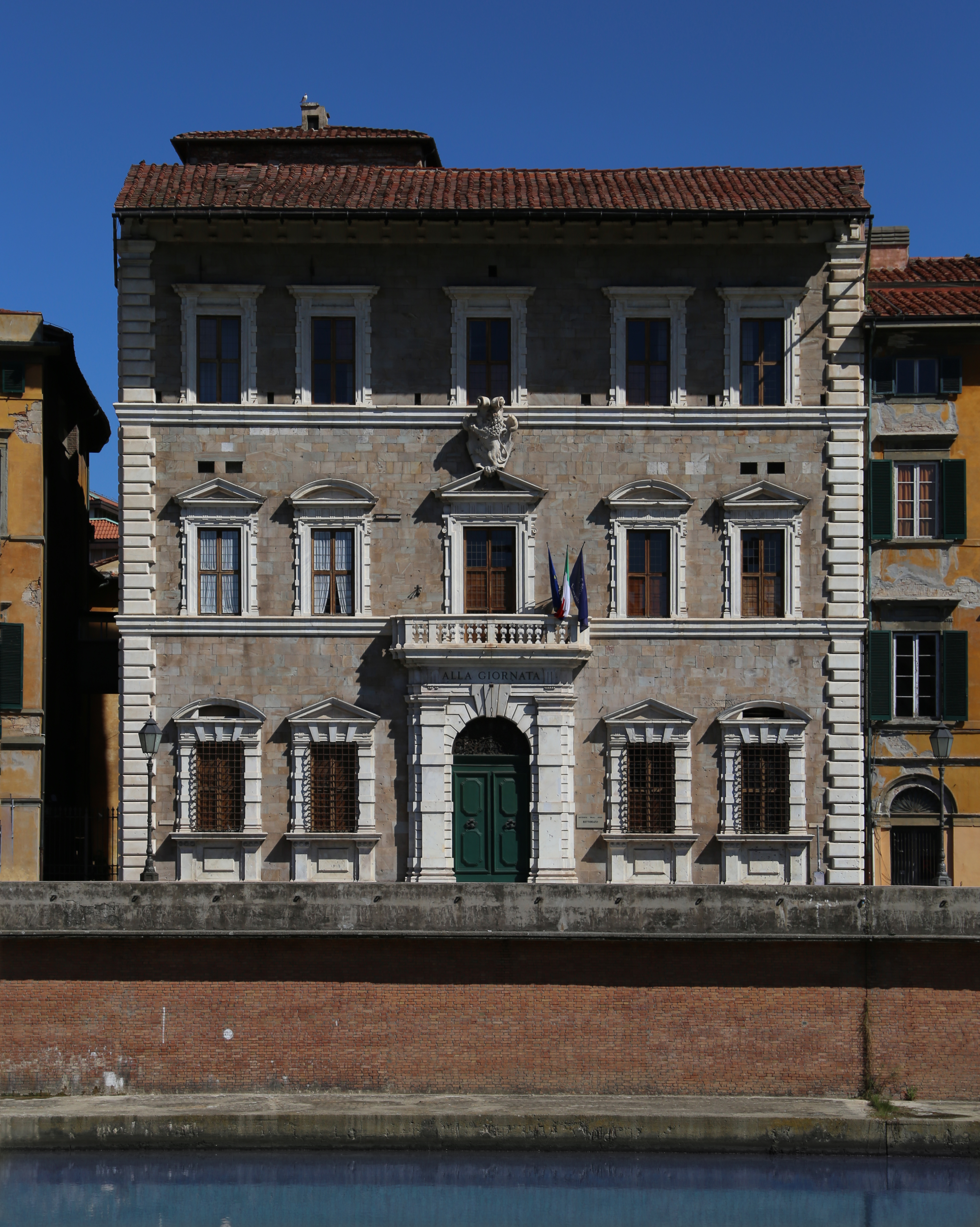 Palazzo alla Giornata This is a photo of a monument which is part of cultural heritage of Italy.